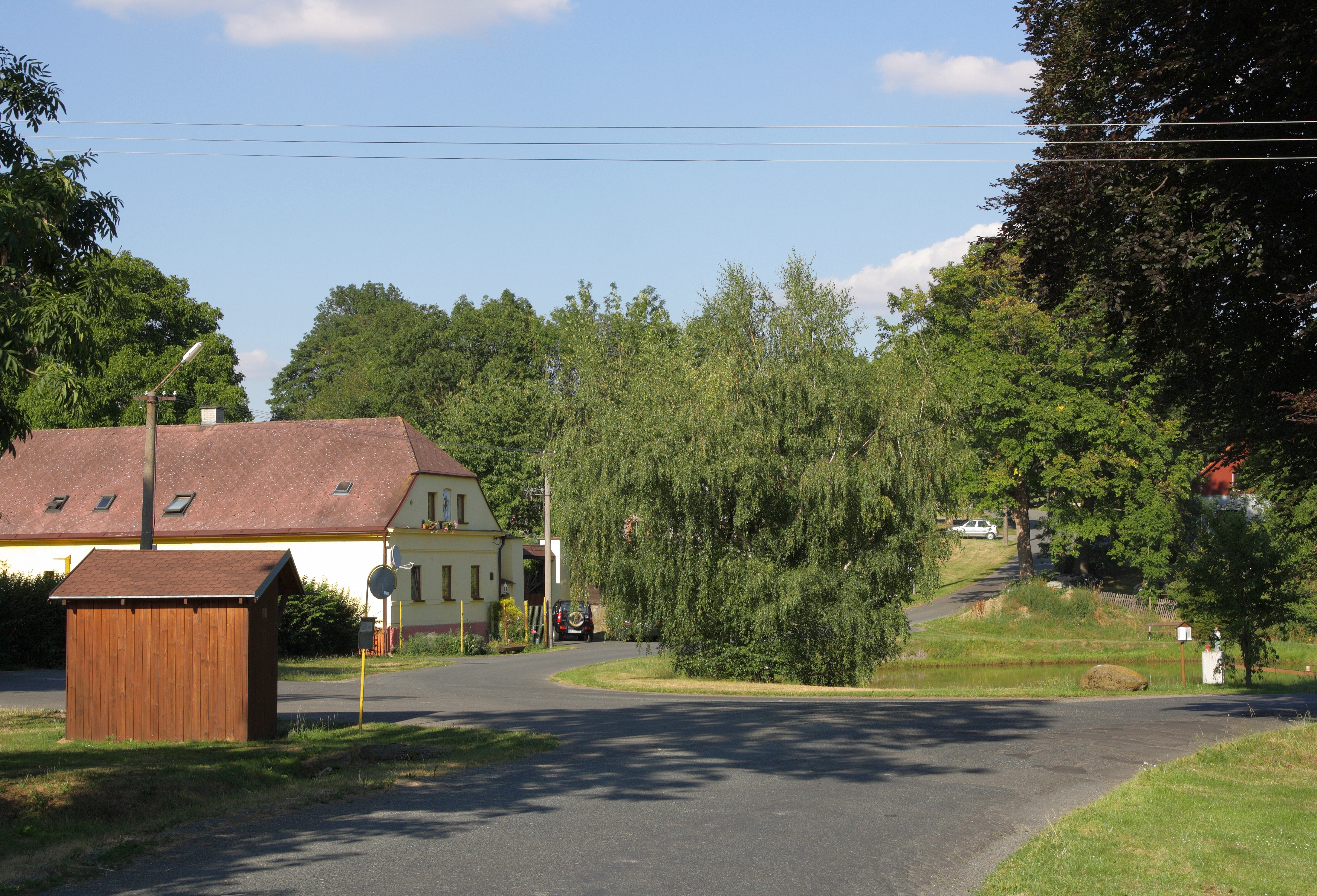 Hora Svatého Václava - náves od Z.